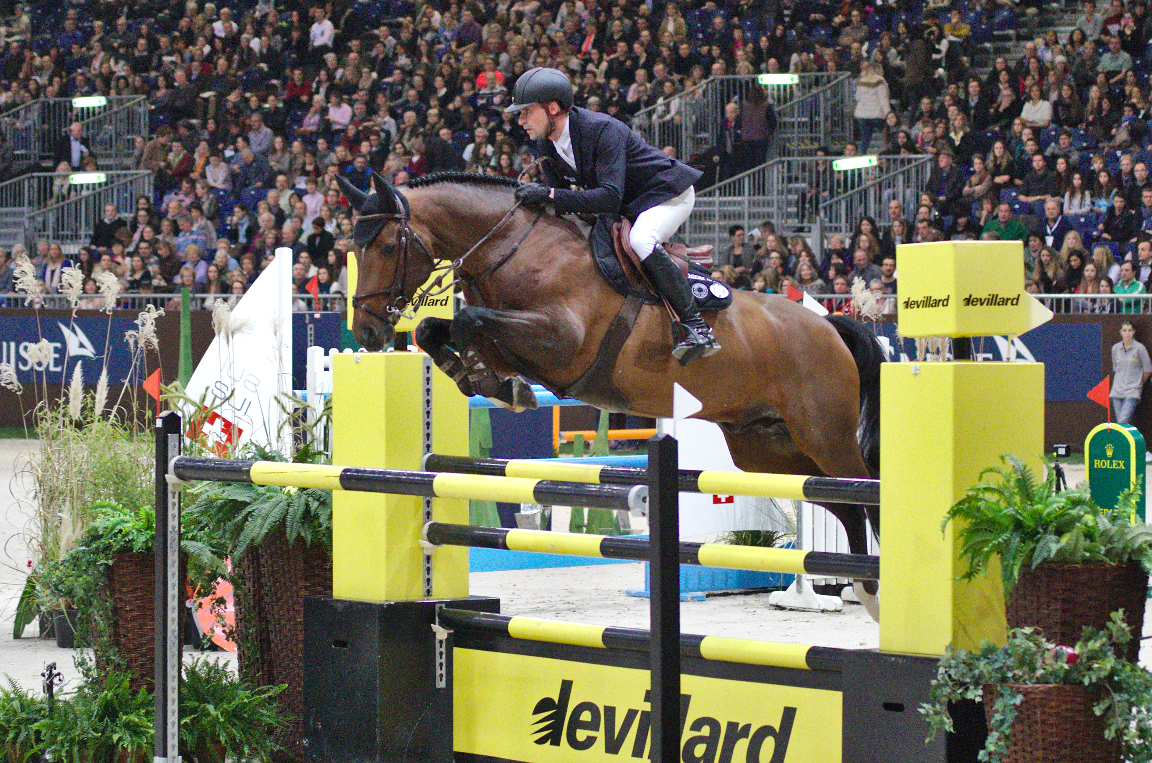 54eme CHI de Genève - 20141213 - Prix Credit Suisse - Romain Duguet et Otello du soleil